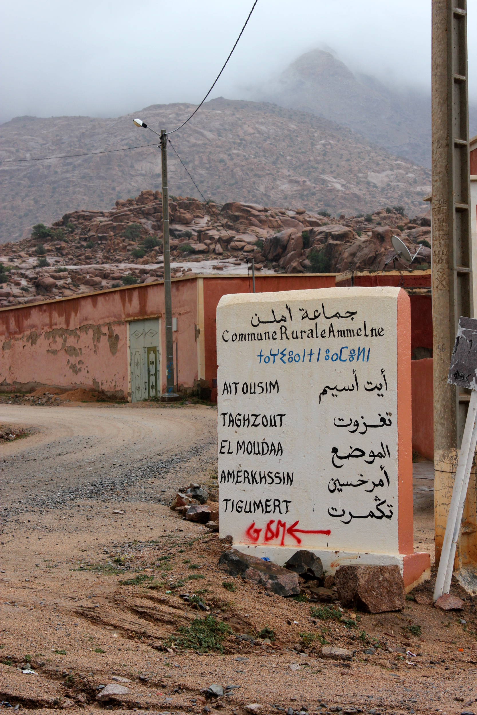 Wegweiser mit Aufschriften in Arabisch, Französisch und Tamazight südlich von Tafraoute, Marokko.Hornjoserbsce: Trojorěčny pućnik (arabsce, francosce, tamazight) južnje wot Tafraoute, Marokko.